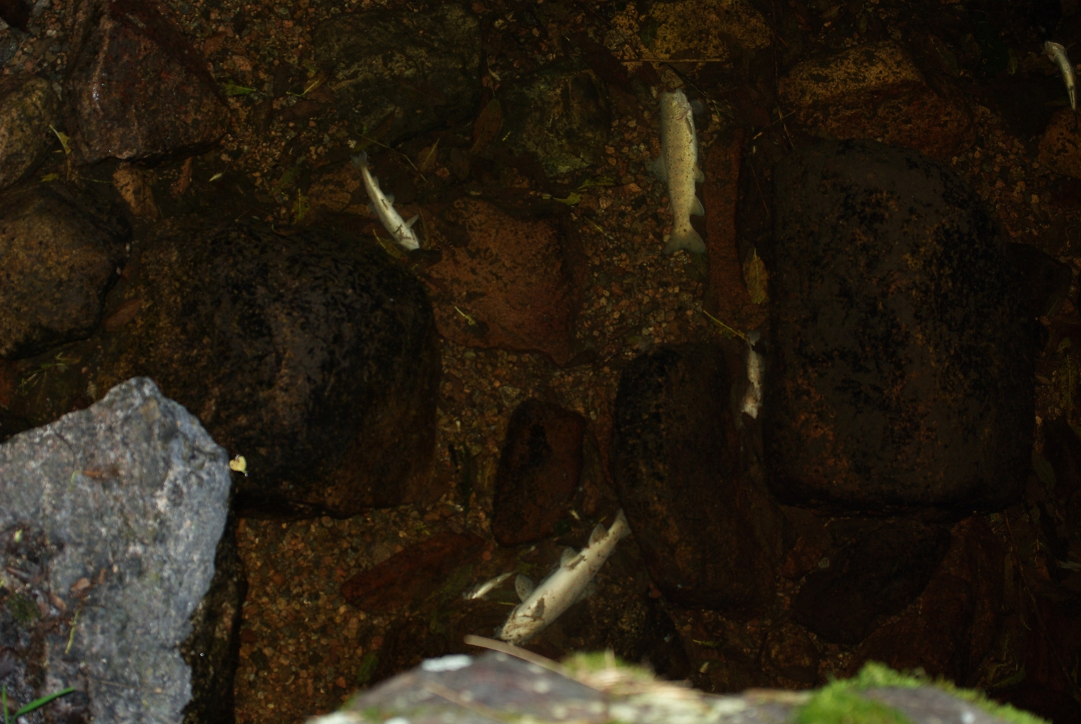 Urseebach (Urseetal) – Tote Bachforellen im stehenden Bach bei Trockenheit, aufgenommen in der Dämmerung mit Blitzlicht